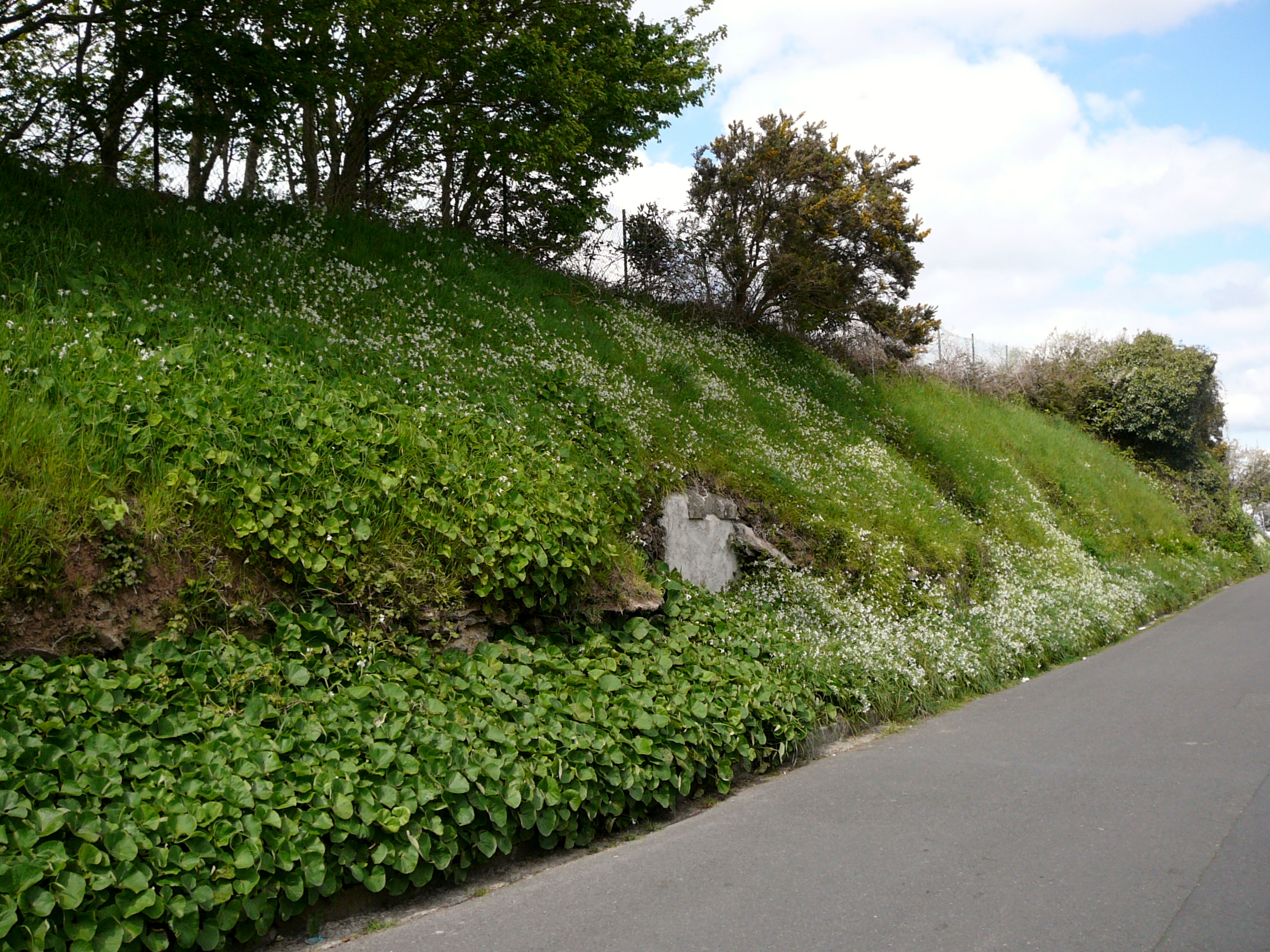 Forte Keranroux